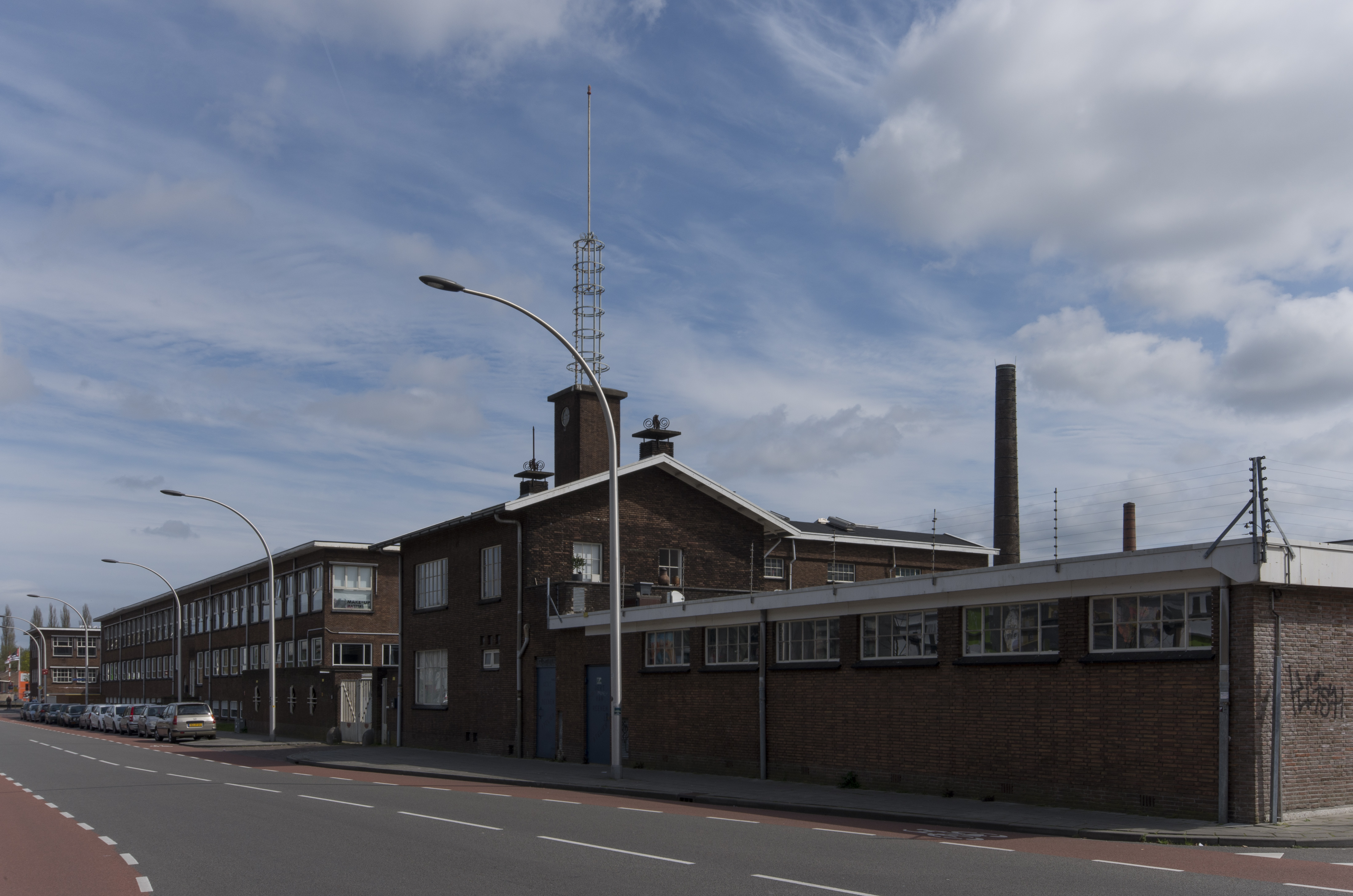 Voormalige Prodentfabriek in Amersfoort, gezien vanaf de Brabantsestraat